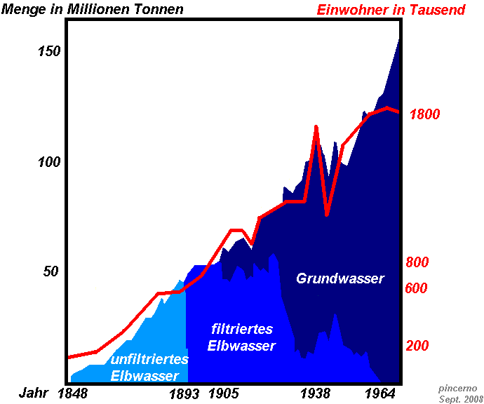 Wasserversorgung in Hamburg: Die Grafik zeigt den Wasserverbrauch und die Bevölkerungsentwicklung von 1848 bis 1964; grafisch dargestellt sind die Versorgung mit unfiltriertem Elbwasser ab 1848, mit filtriertem Elbwasser ab 1893, mit Grundwasser ab 1905 und ausschließlich mit Grundwasser ab 1964.